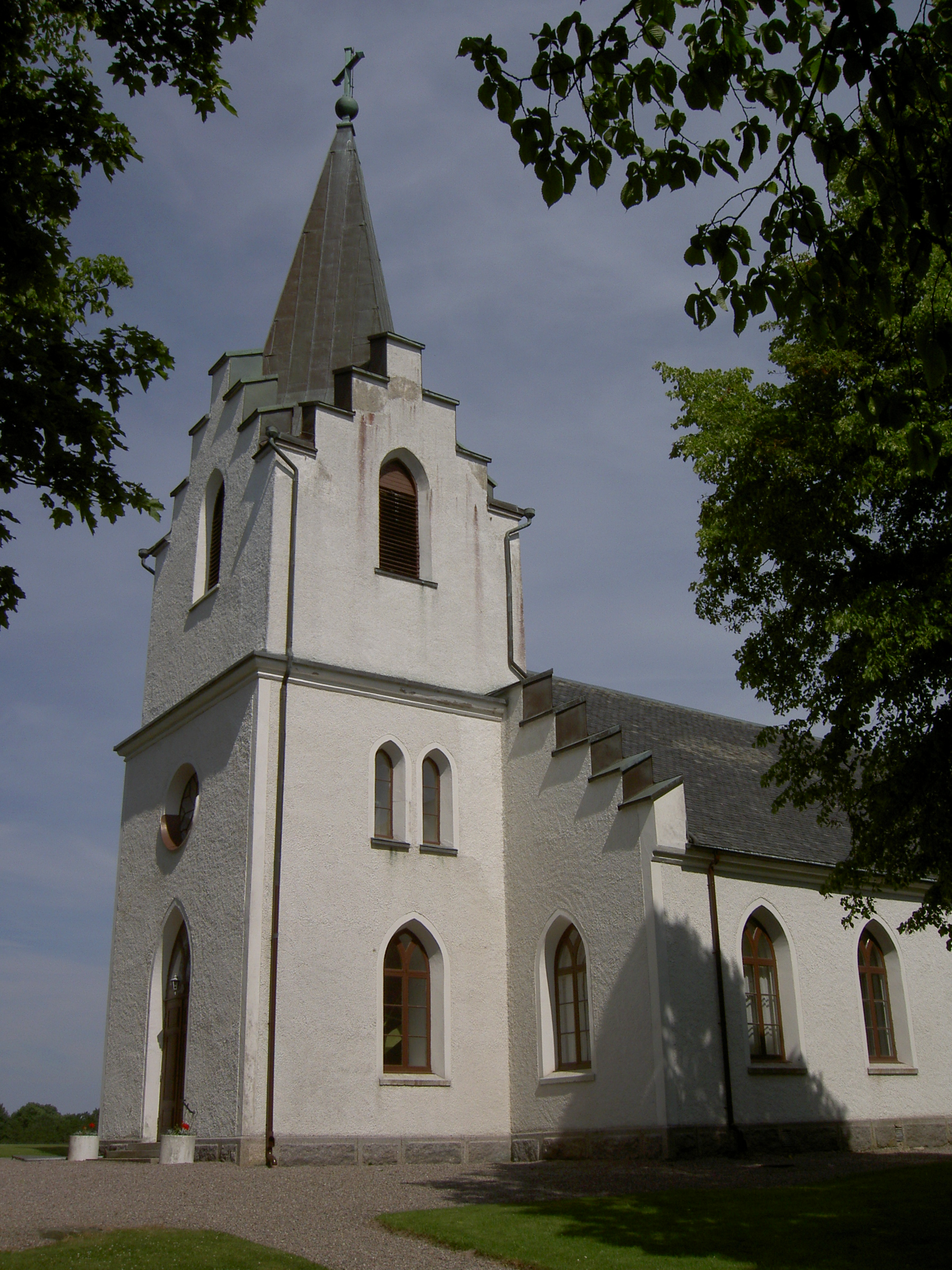 Erikstads kyrka